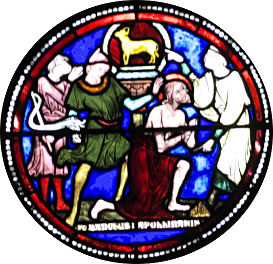 Kathedrale Saint-Pierre-et-Saint-Paul in Troyes im Département Aube (Champagne-Ardenne/Frankreich), Bleiglasfenster im Chor (baie 22) aus dem 13. Jahrhundert, im 19. Jahrhundert restauriert und ergänzt; Darstellung: Szenen aus dem Leben des hl. Apollinaris